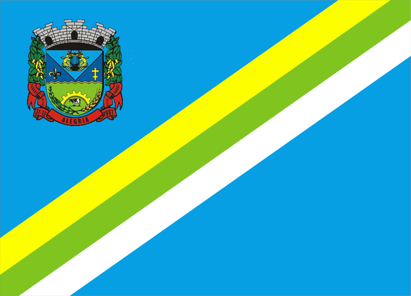 Português do Brasil: Bandeira Oficial de Alegria - RS, Brasil.